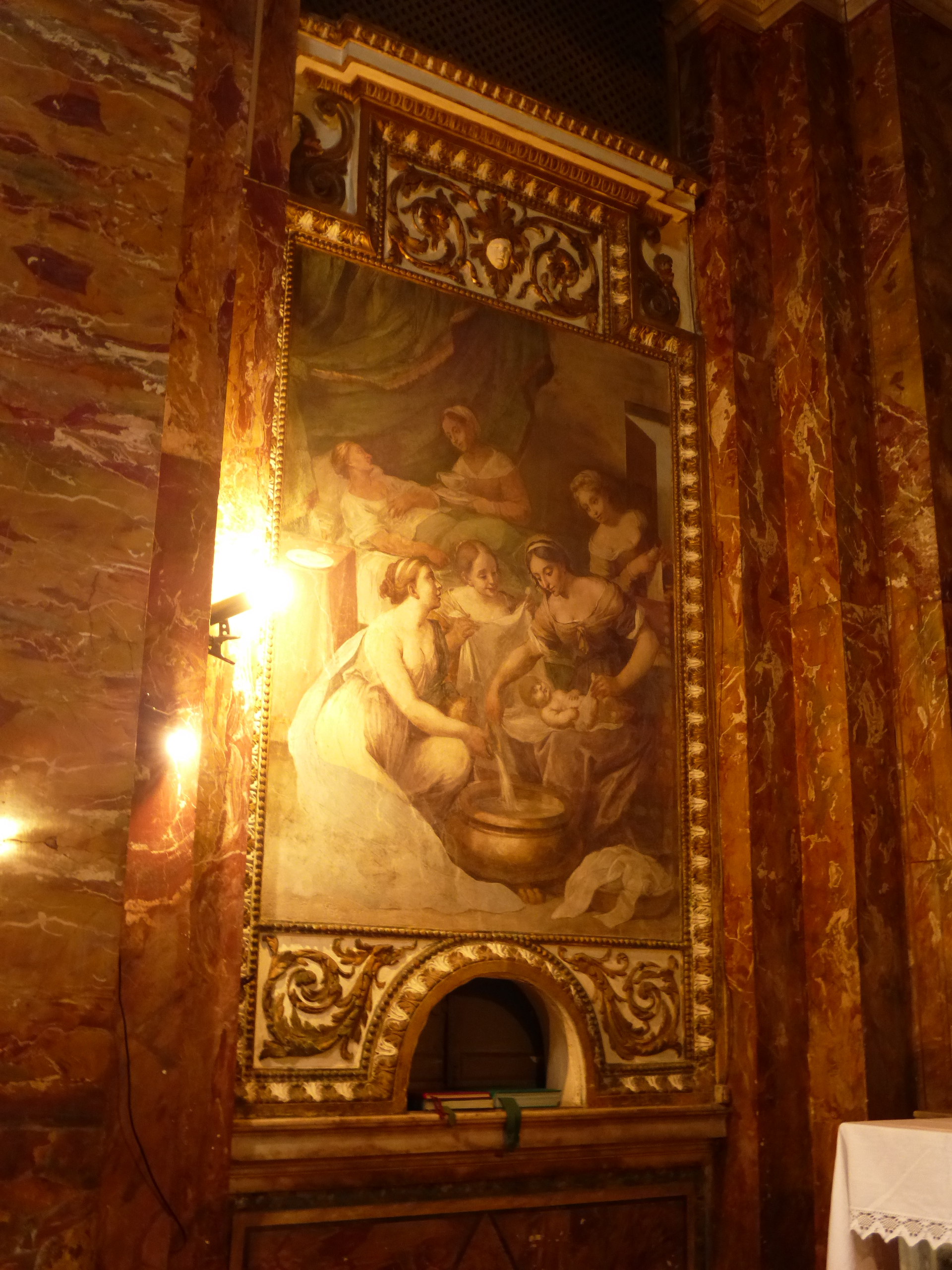 Roma, santa Maria in Porta Paradisi. Interno.